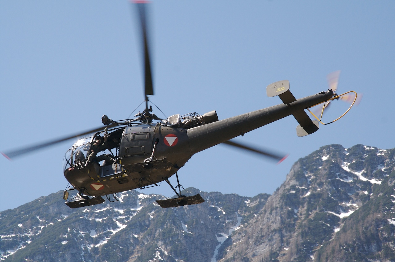 Alouette III des Bundesheeres